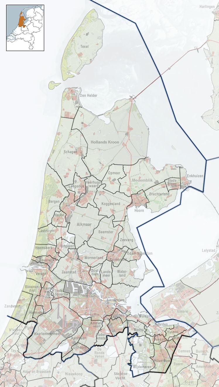 Referentiekaart van Provincie Noord-Holland, met indeling van gemeenten (2010) en impressie van het landschap. Door Jan-Willem van Aalst, samengesteld uit publiek beschikbare geo-data: Referentie-ondergrond (kustlijn, steden, wegen) gerasterd uit de OpenStreet Map OSM. ( Inhoud is beschikbaar onder de Creative Commons Attribution-ShareAlike 3.0 license. Referentie-ondergrond op water bewerkt vanuit Gebruik is vrij met bronvermelding NLR en ESA. Vectorgrenzen van gemeenten en regio's vrij ter beschikking gesteld met dank aan cartografen van brandweerregio's Hollands-Midden en IJsselland; gerasterd in Photoshop. Hoogte-aanduidingen (reliëf) gerasterd uit de AHN Viewer ( gebruik is vrij met bronvermelding (c) AHN, Overige kenmerken op de kaart: eigen tekenwerk van Jan-Willem van Aalst, op basis van gerasterde gemeentegrenzen.